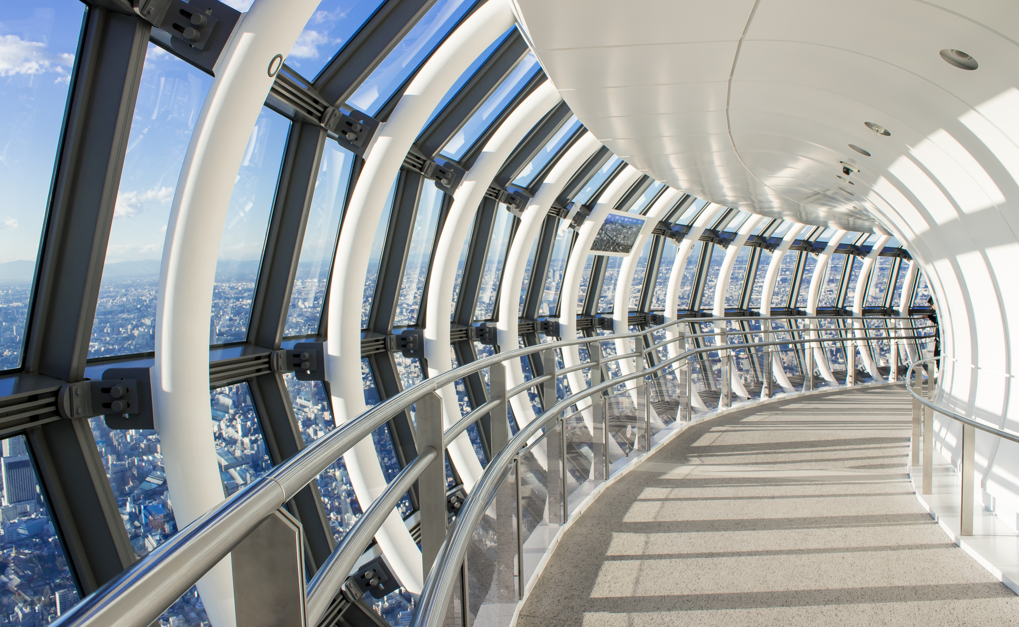 スカイツリー第二展望台の天望回廊